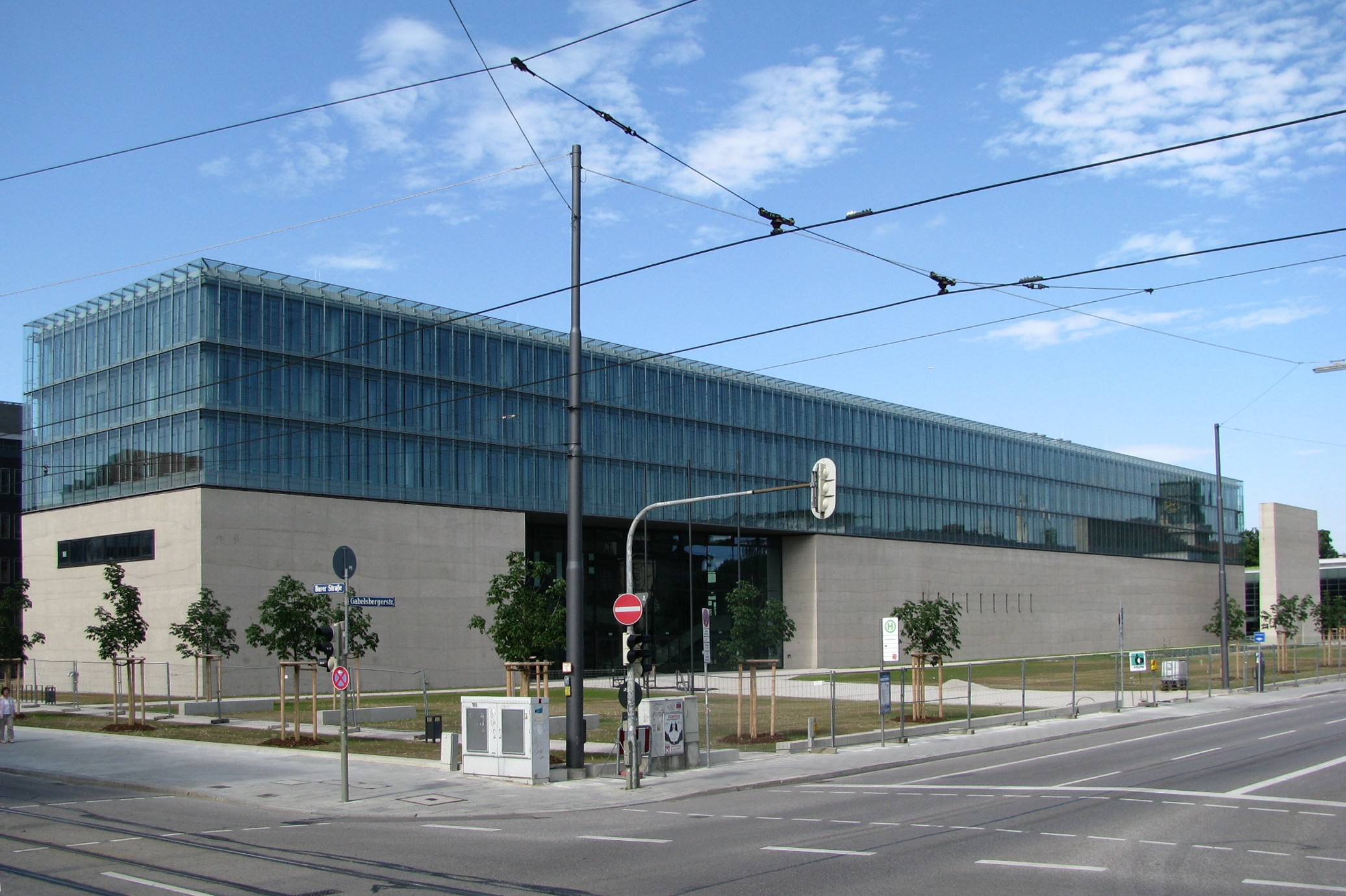 Das neue Gebäude für die Hochschule für Fernsehen und Film München und das Staatliche Museum Ägyptischer Kunst in der Gabelsbergerstraße, gegenüber der Alten Pinakothek im Kunstareal München, kurz vor der Übergabe an die Nutzer.